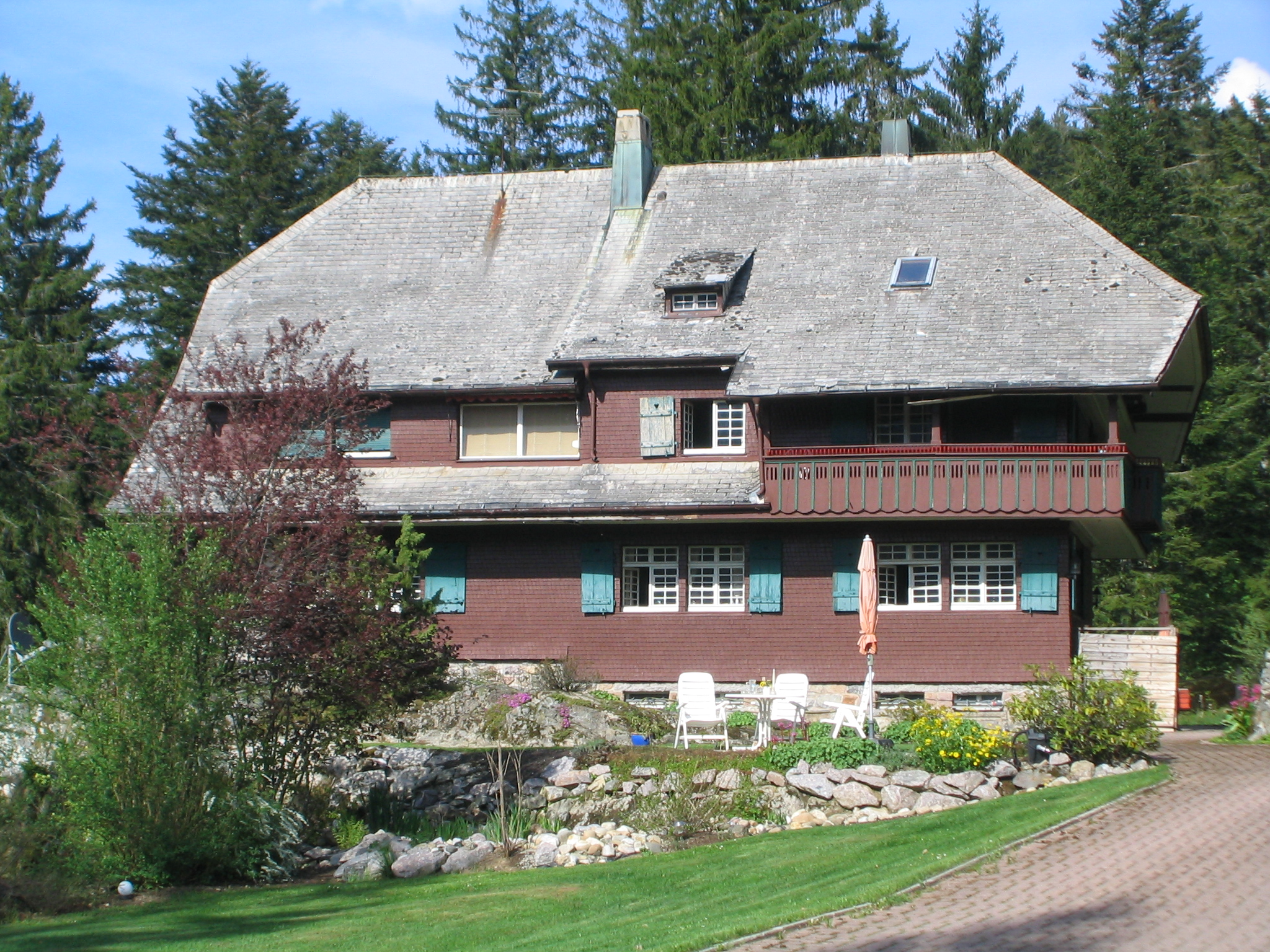 Ehemaliges Haus des Malers Hermann Dischler in Hinterzarten